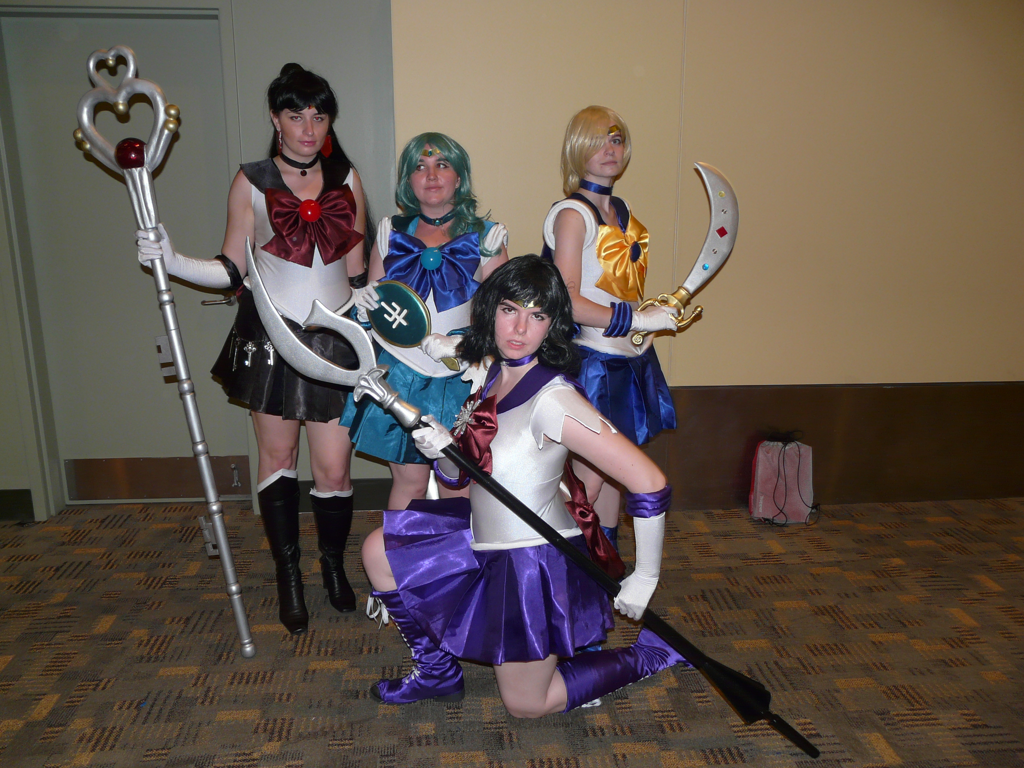 Otakon 2012 cosplay